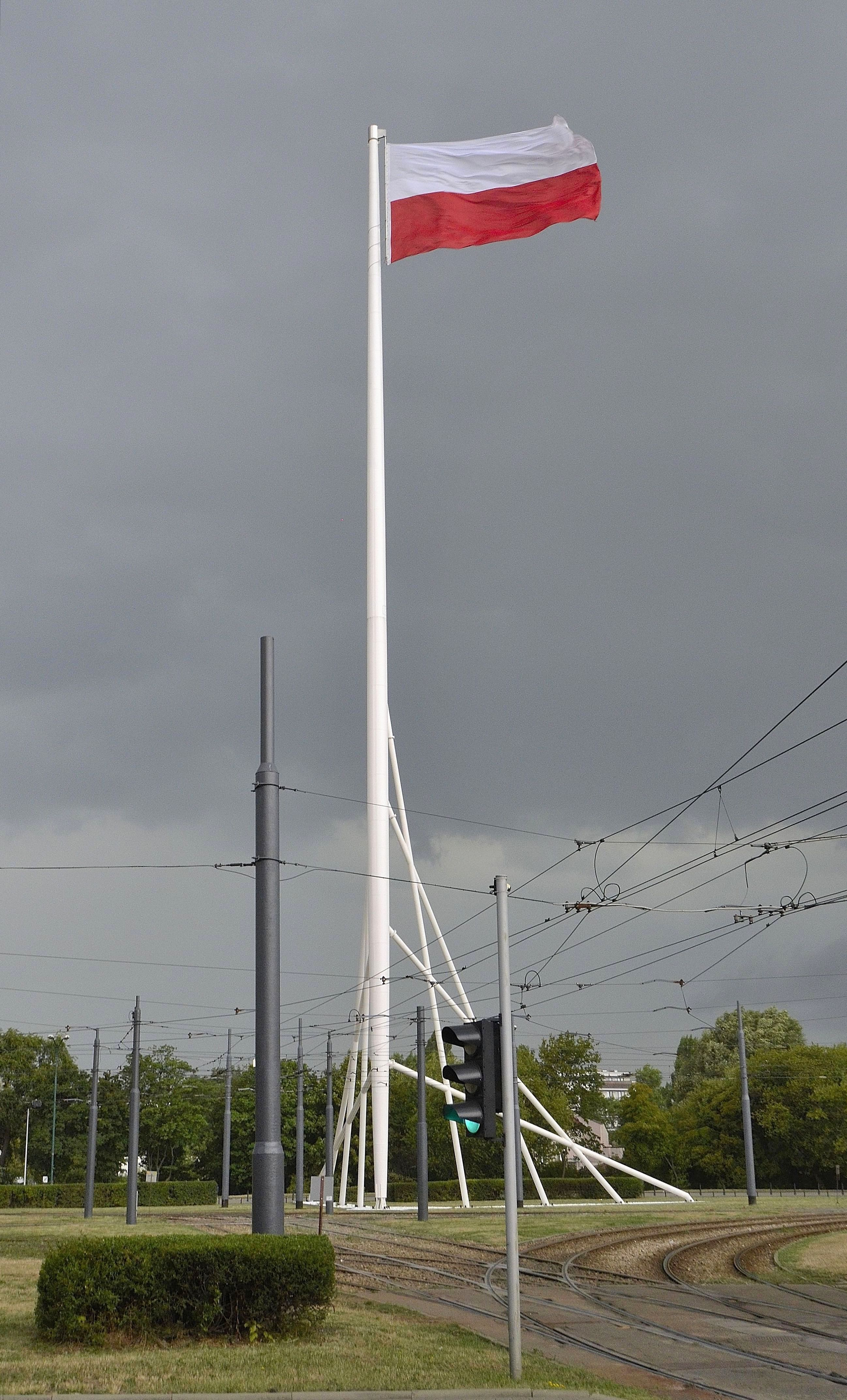 Maszt Wolności w Warszawie